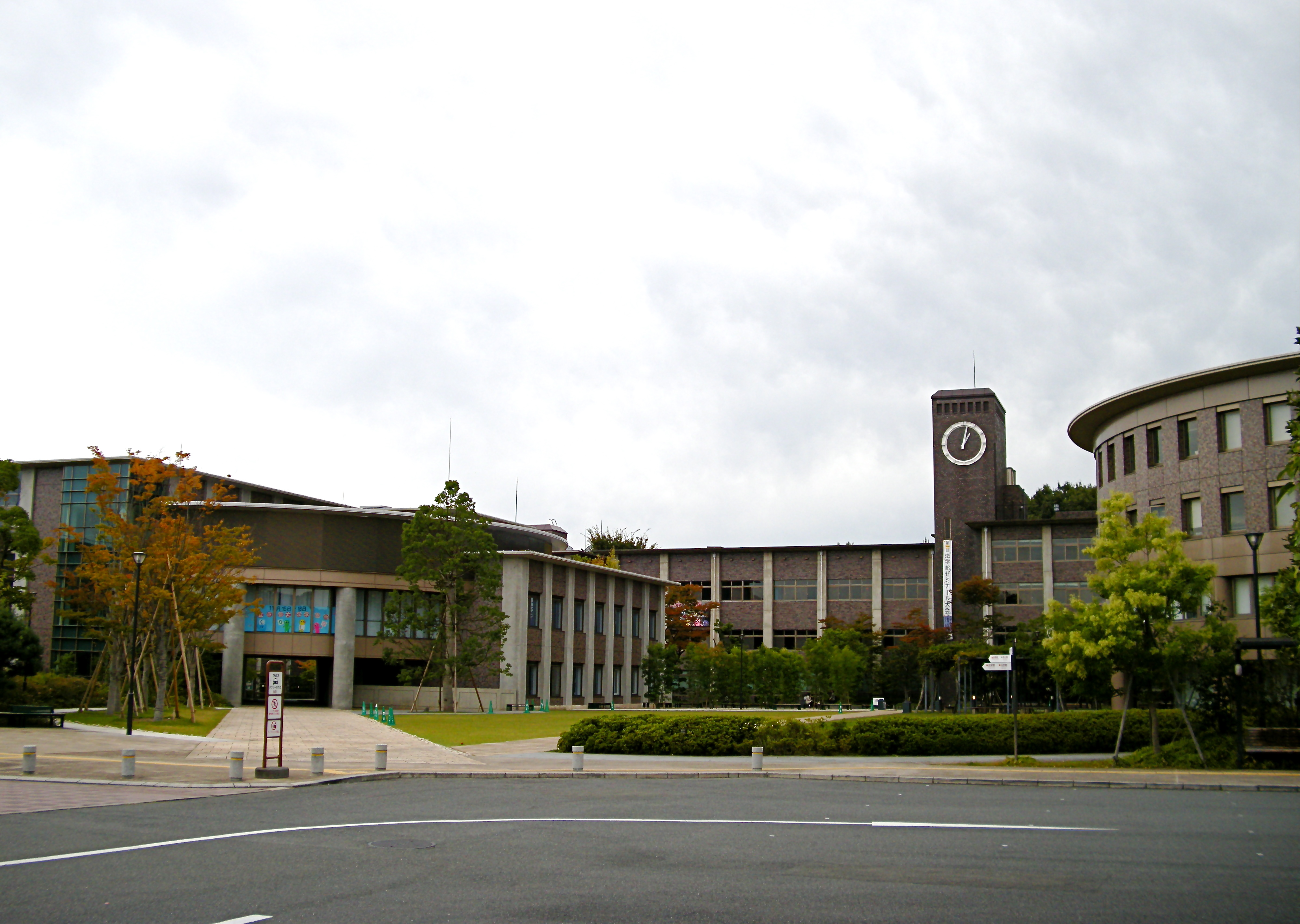 Kinugasa Campus Open Space (Ritsumeikan University, Kyoto, Japan)